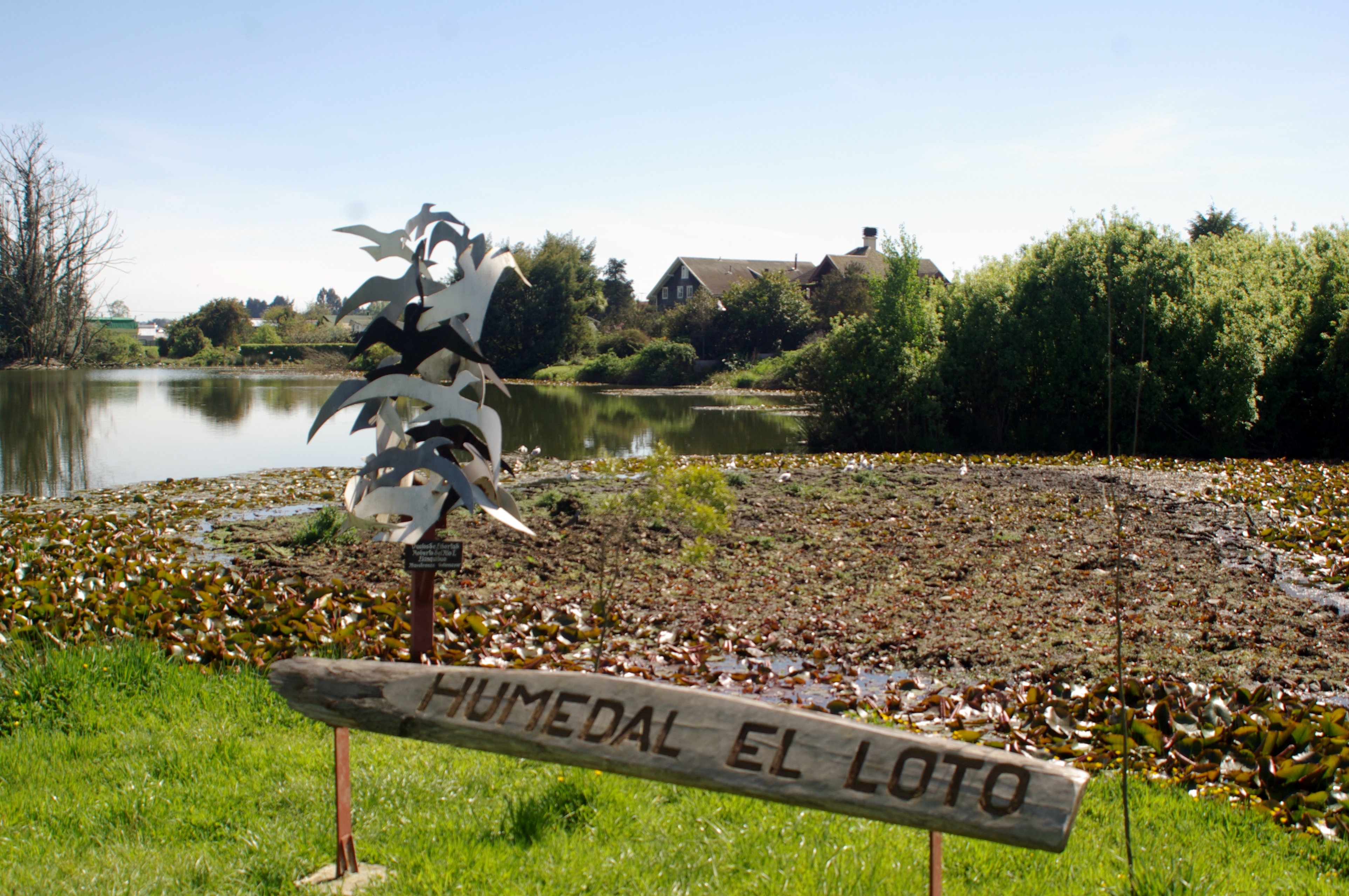 El humedal El Loto (ciudad de Llanquihue, Chile) con la escultura Vuelos de libertad de Roberto del Río. Al frente, la Casa Werner, hotel boutique y restaurante, noviembre de 2016